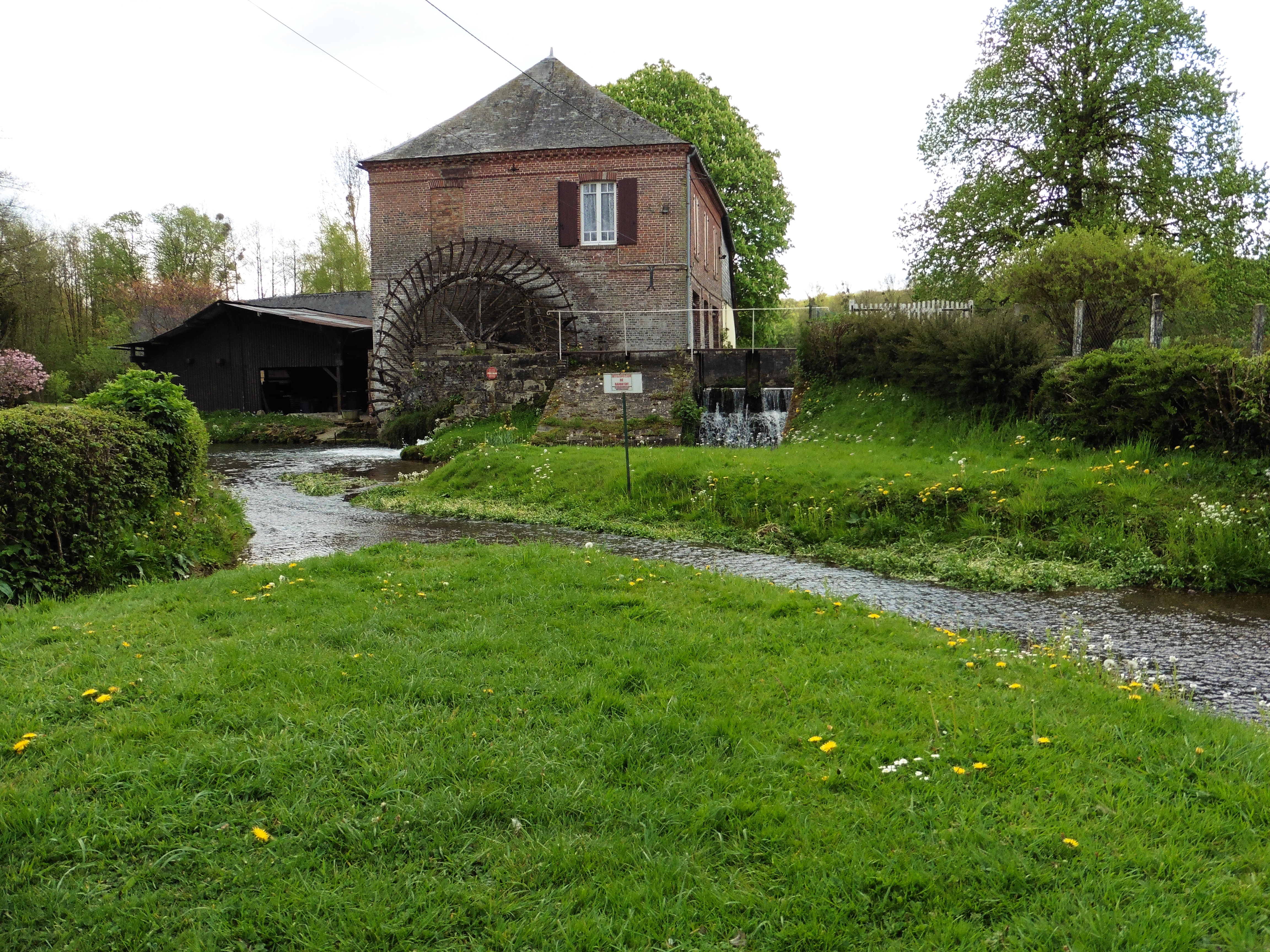 Le moulin de Nelly Saint-Samson-la-Poterie Oise Picardie